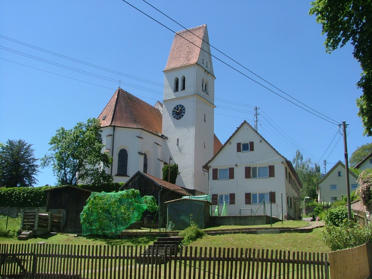 Pfarrkirche St. Maria im oberschwäbischen Osterberg